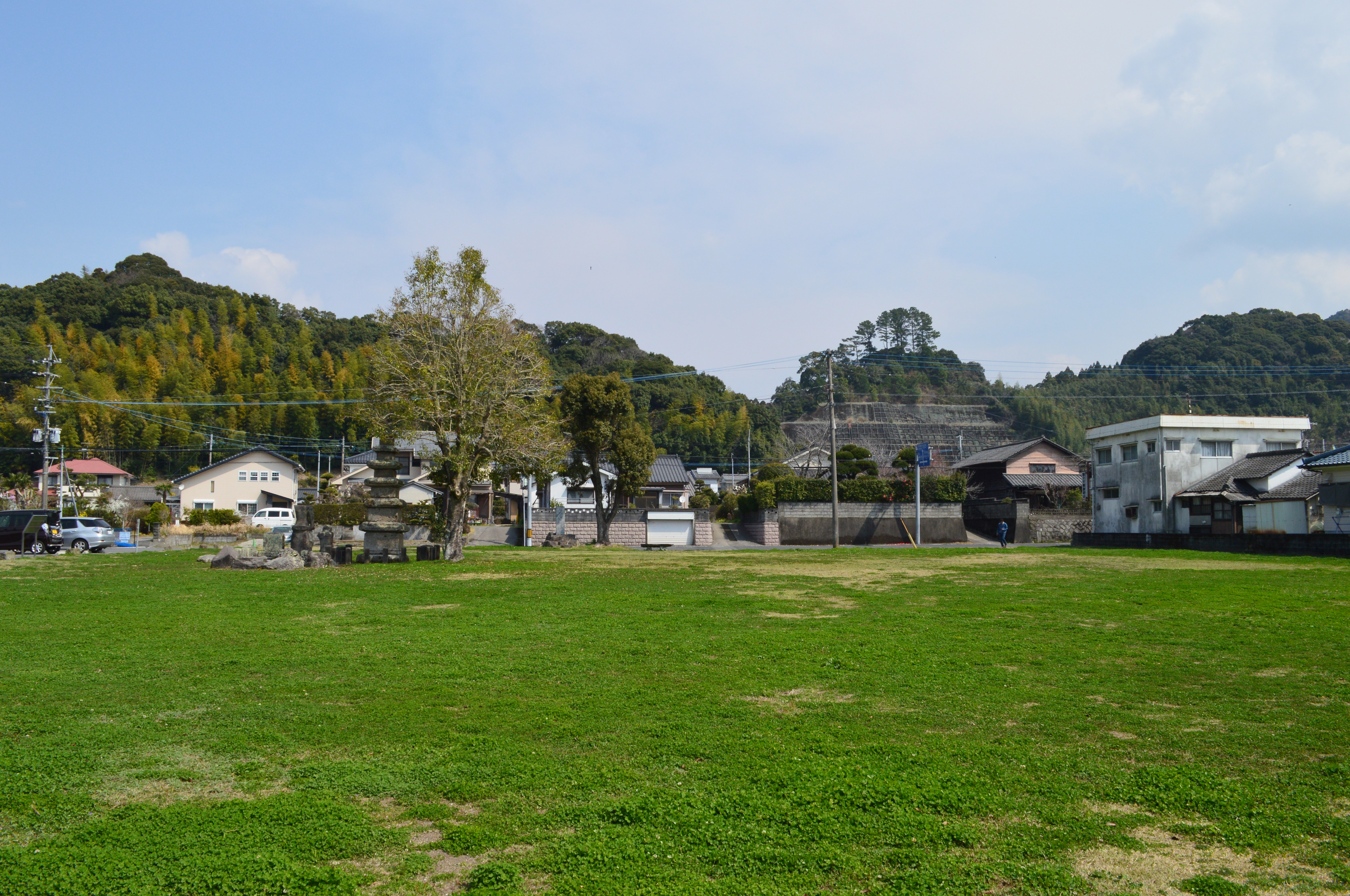 大隅国分寺跡 史跡地概観